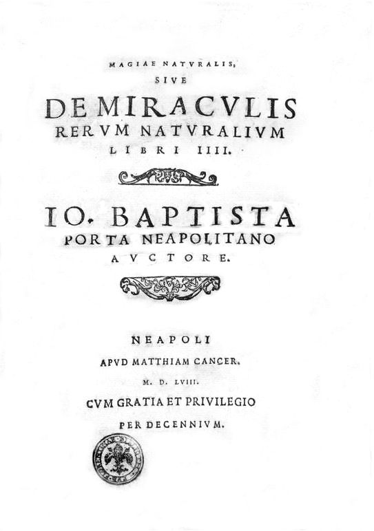 Frontiscipe de Magia naturalis (1558) de Della Porta, publié à Naples